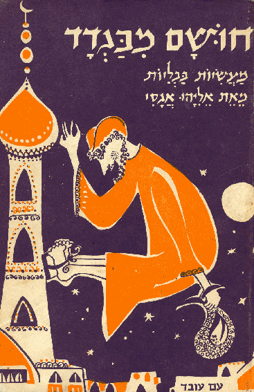 תמונת השער של הספר "הגנב מבגדד" מאת אליהו אגסי.